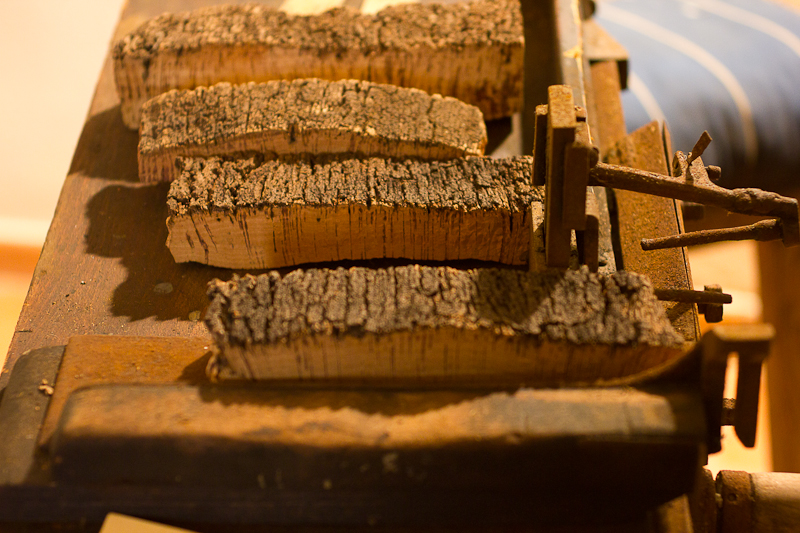 Particolari di un'esposizione al Museo del Sughero di Calangianus.